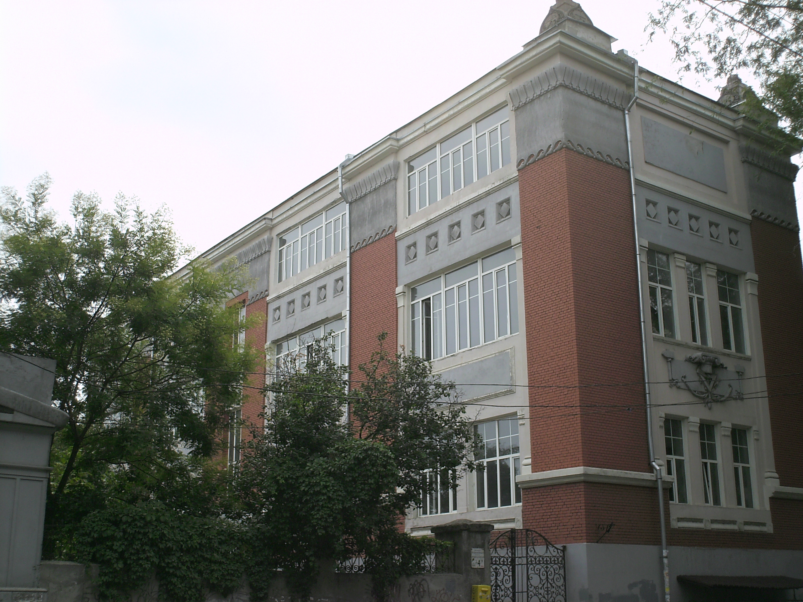 Odessa Arts College